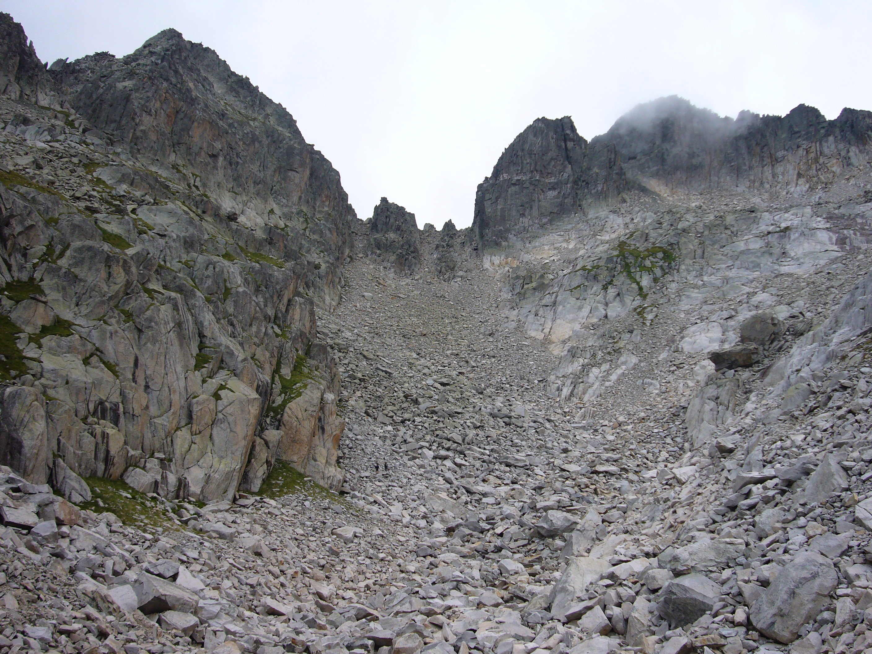 Collet de Contraix, vist des de la Vall de Colieto; la Vall de Boí, Alta Ribagorça, Catalunya